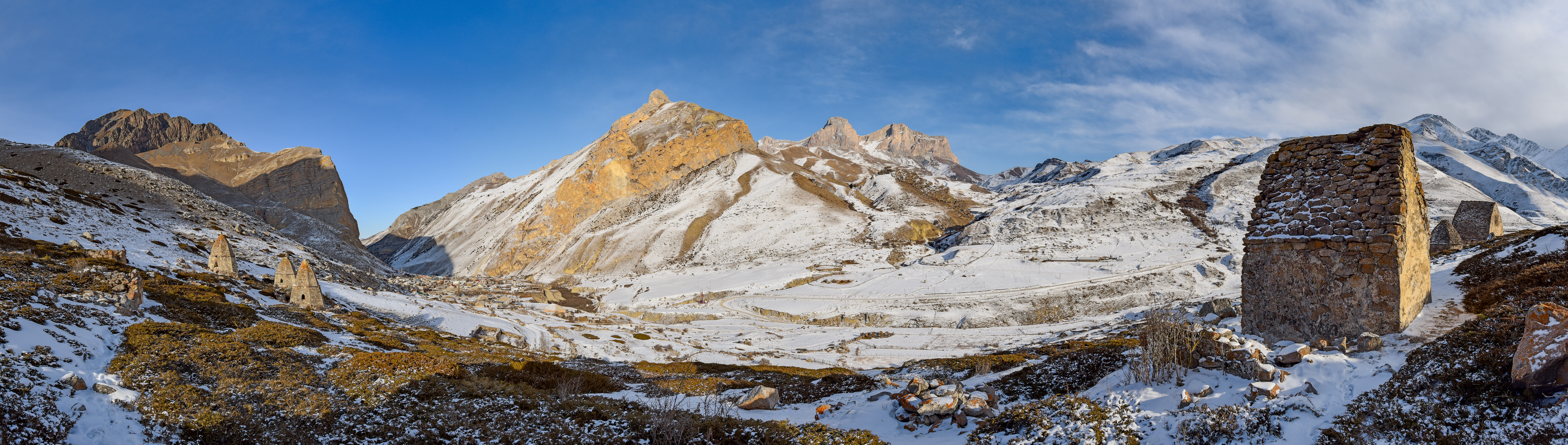 Вид на село Эльтюбю. Гробницы